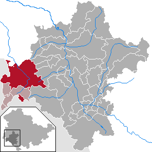 Kaltennordheim im Landkreis Schmalkalden-Meiningen, Thüringen